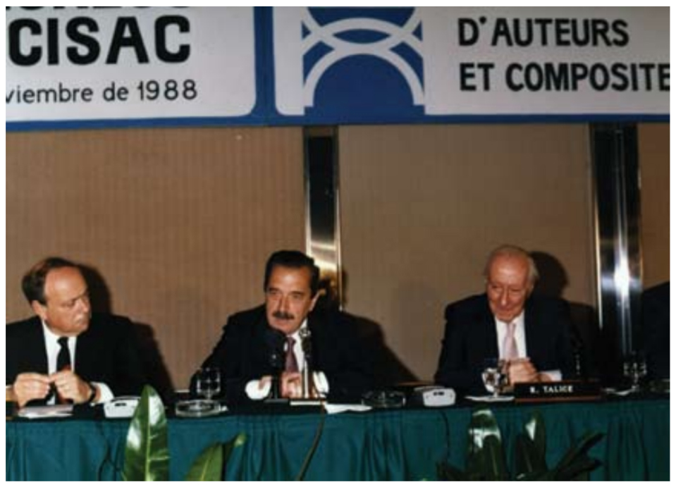 El ex presidente de Argentina Raúl Alfonsín abre el Congreso de la CISAC en Buenos Aires en 1988. A su lado Roberto Tálice representando a Argentores y Atilo Stampone a SADAIC.